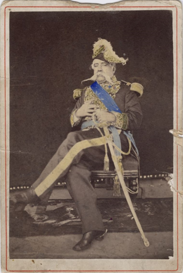 General Basilio Urrutia Vasquéz, ministro de guerra.